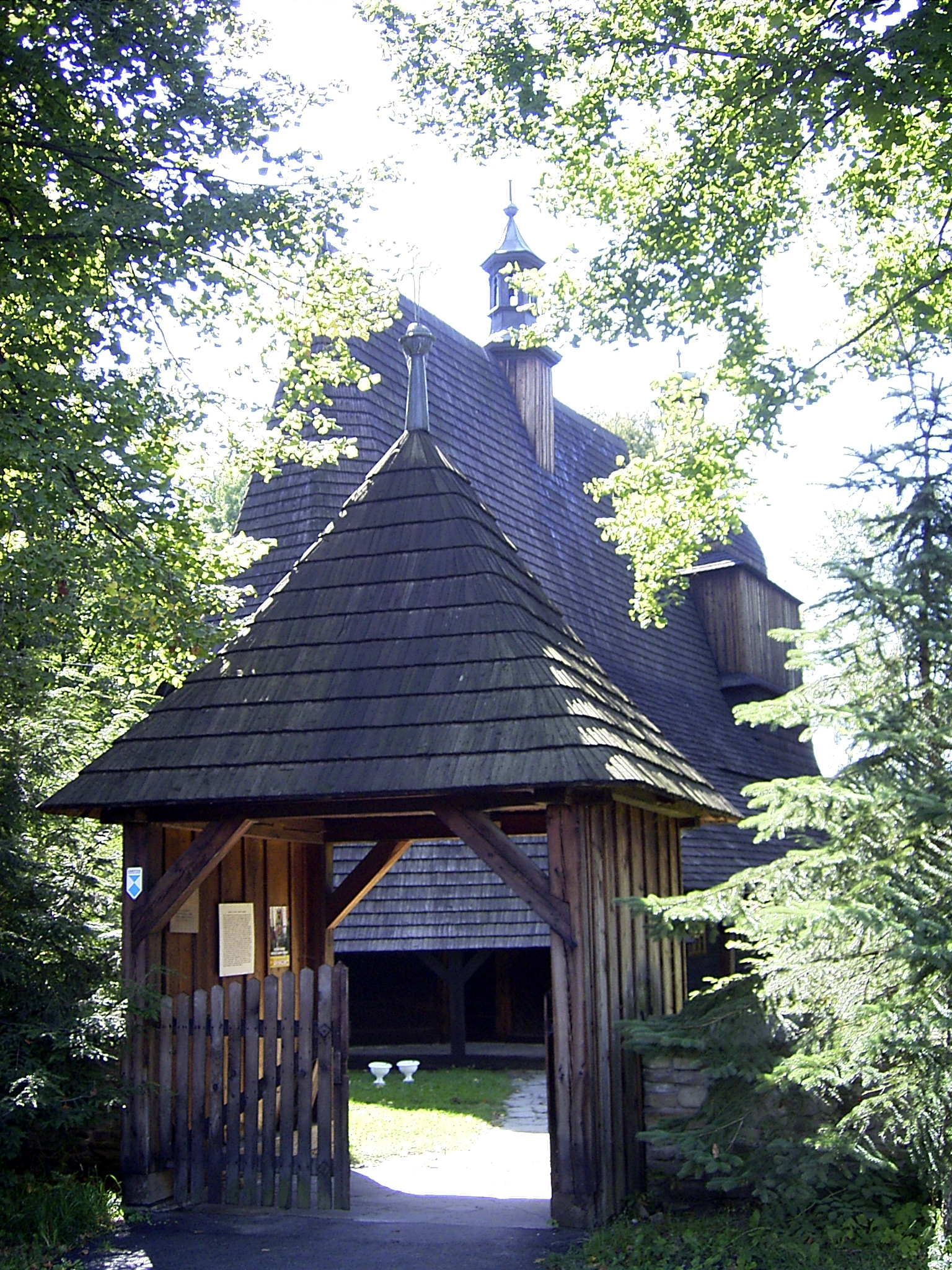 Kościółek pw. śś. Filipa i Jakuba w Sękowej (pow. Gorlice)